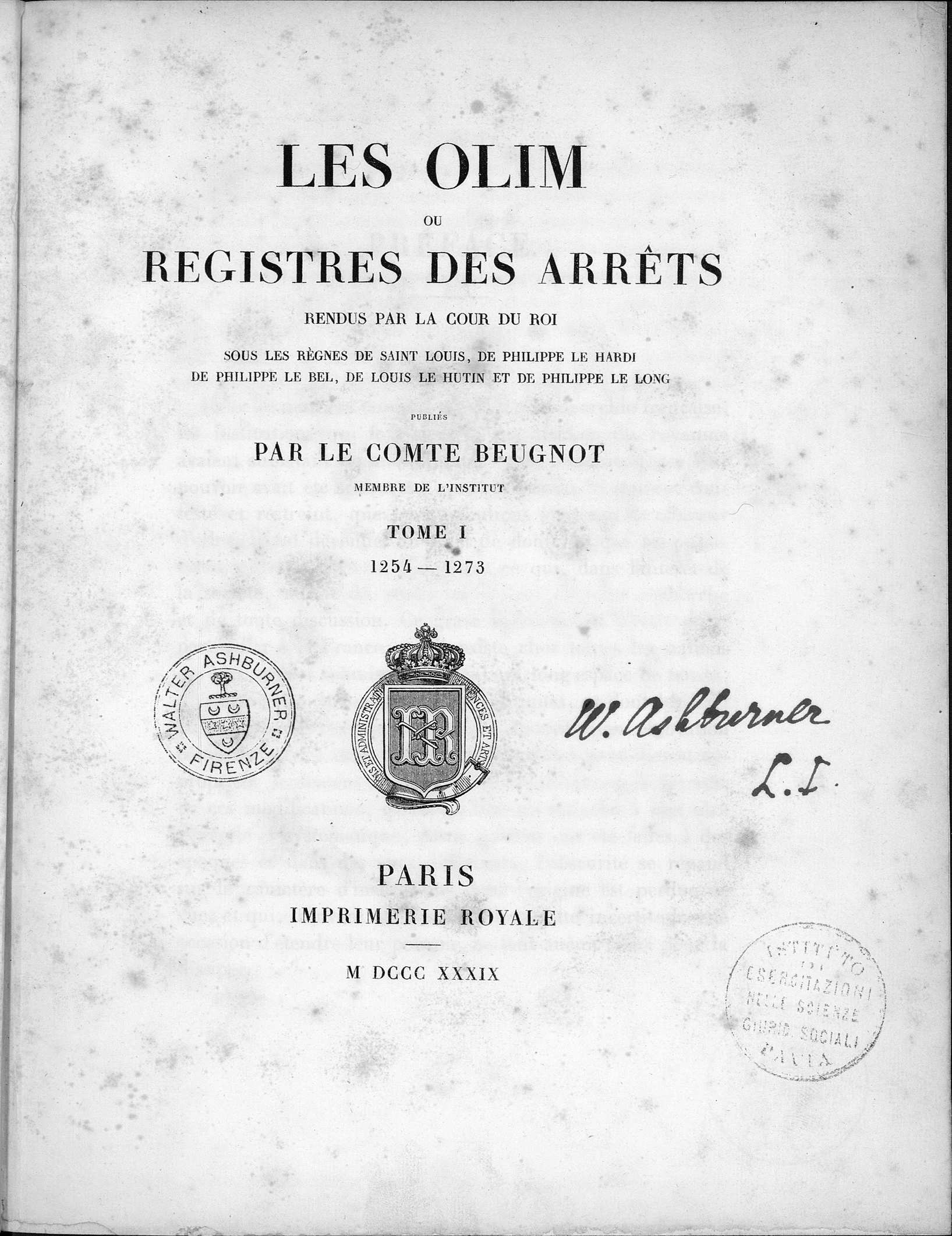 Frontespizio